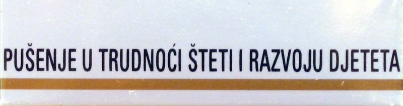 Natpis upozorenja na kutiji cigareta za hrvatsko tržište u 2008. godini